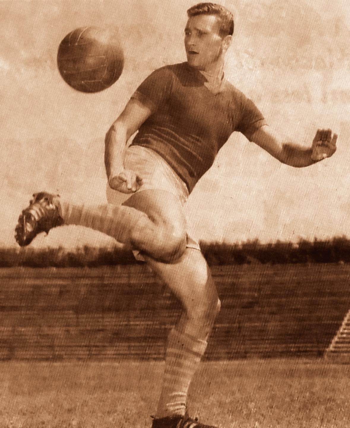 Machos Ferenc edzés közben a Fáy utcai Vasas pályán.